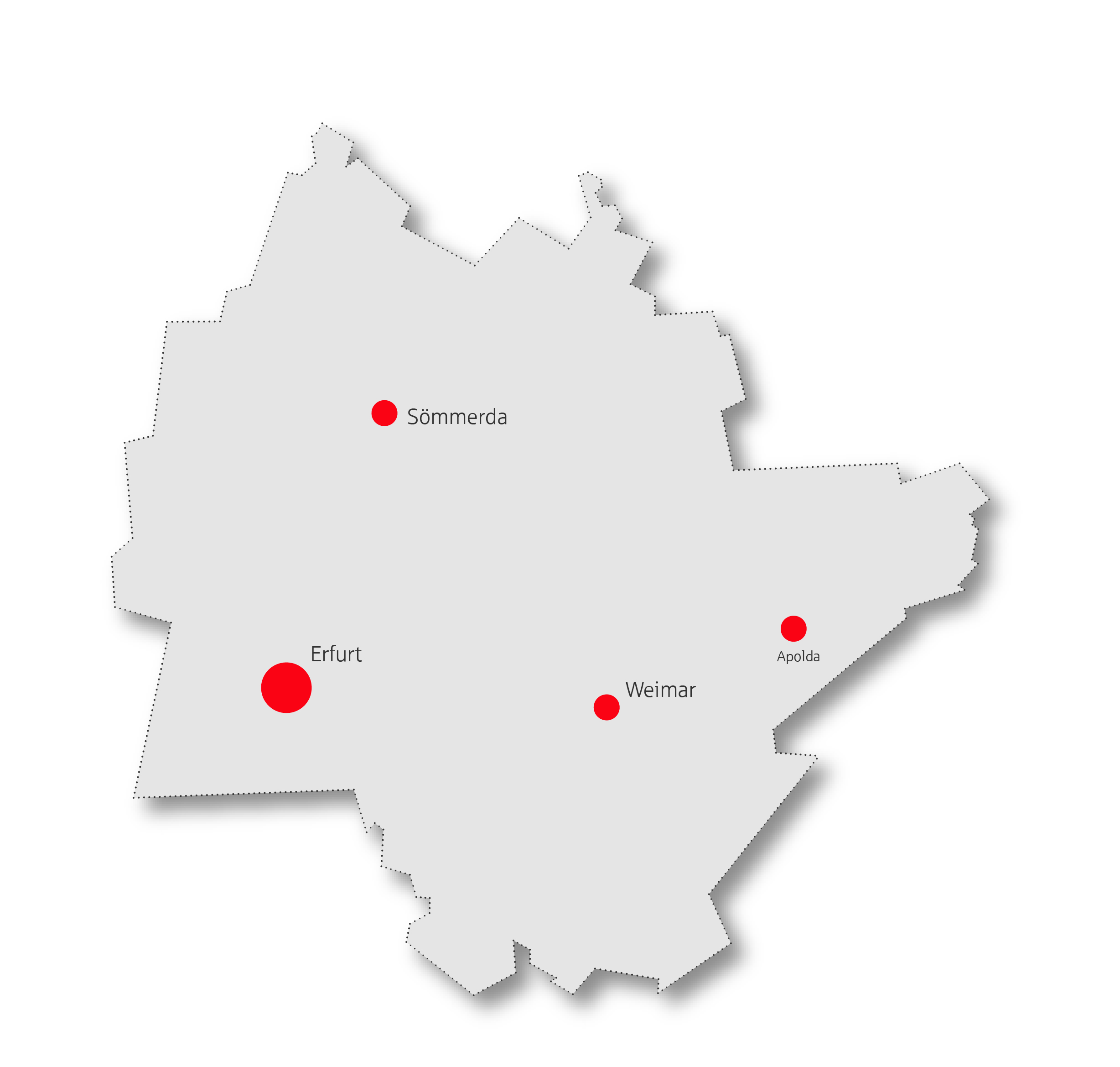 Die Karte umfasst das Geschäftsgebiet der Sparkasse Mittelthüringen.